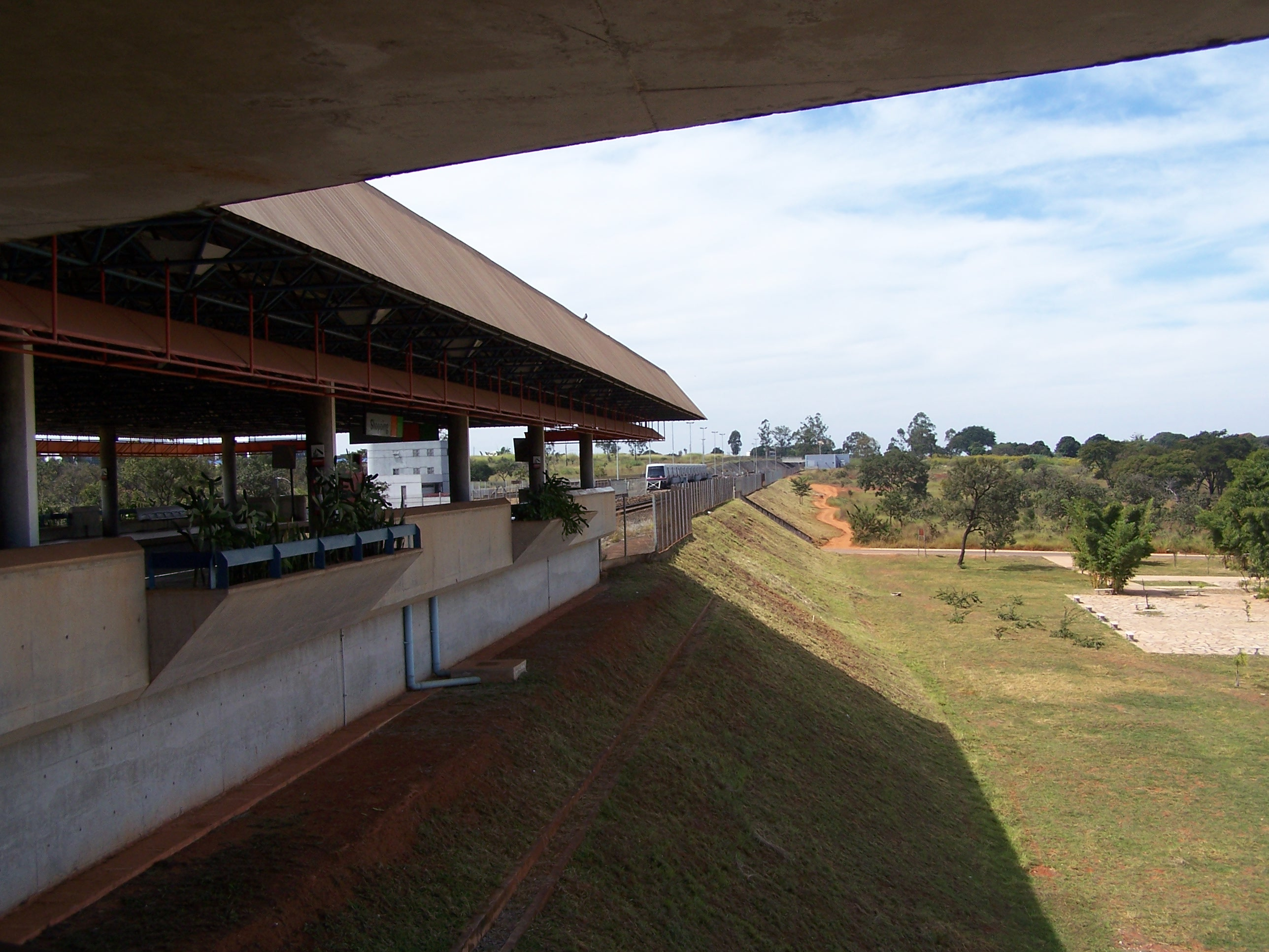 Aspecto da estação Shopping do Metrô do Distrito Federal.